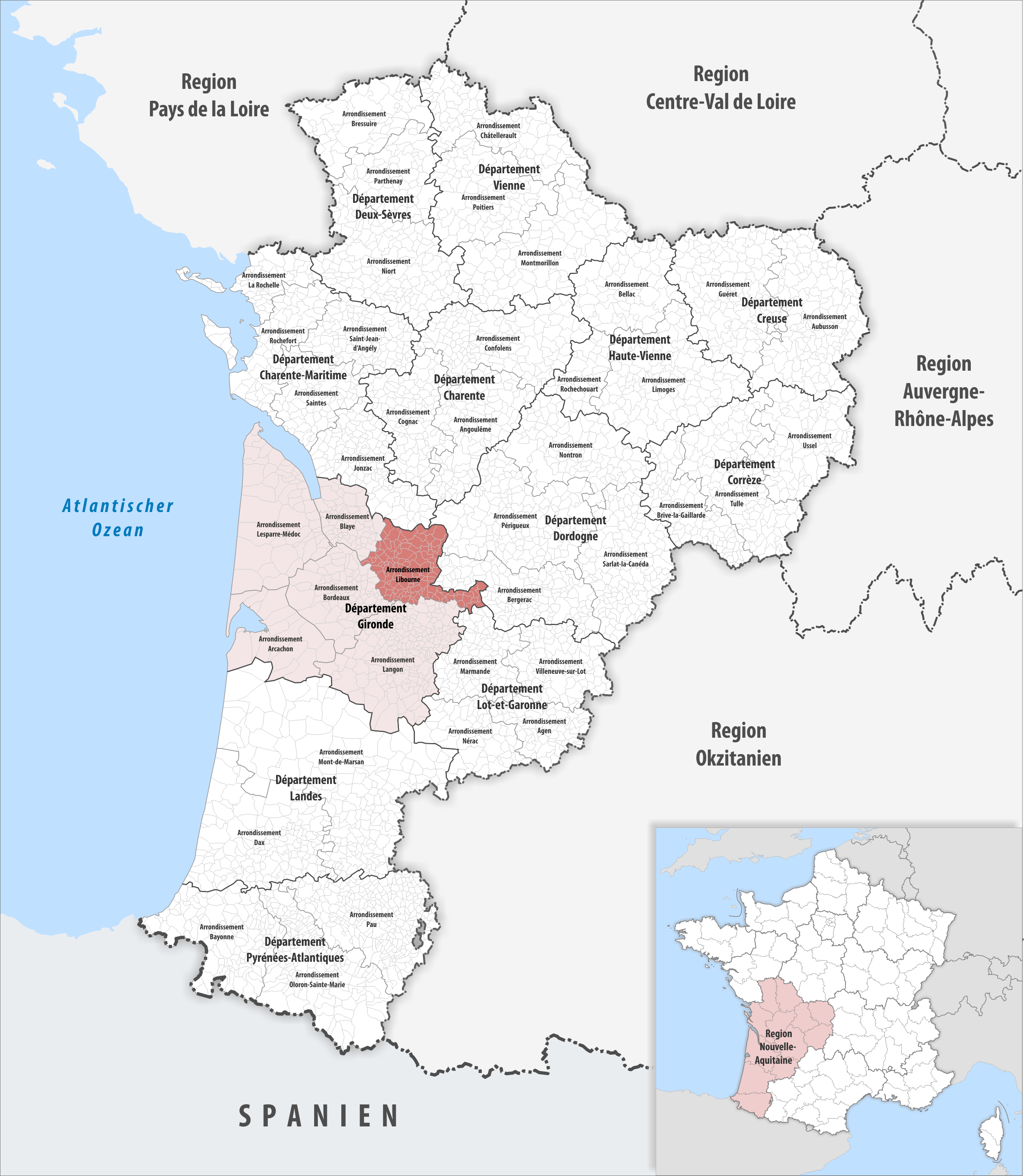 Lage des Arrondissements Libourne